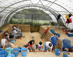 SS1. SAN SEBASTIÁN, 13/08/09.- Vista general del yacimiento de Irikaitz, situado en el municipio guipuzcoano de Zestoa, donde ha sido hallada una placa de hogar utilizada para hacer fuego hace unos 250.000 años, en el periodo Paleolítico Inferior, un hallazgo que podría arrojar luz sobre la capacidad que el Homo Heidelbergensis tenía para utilizar el fuego. EFE/Javier Etxezarreta